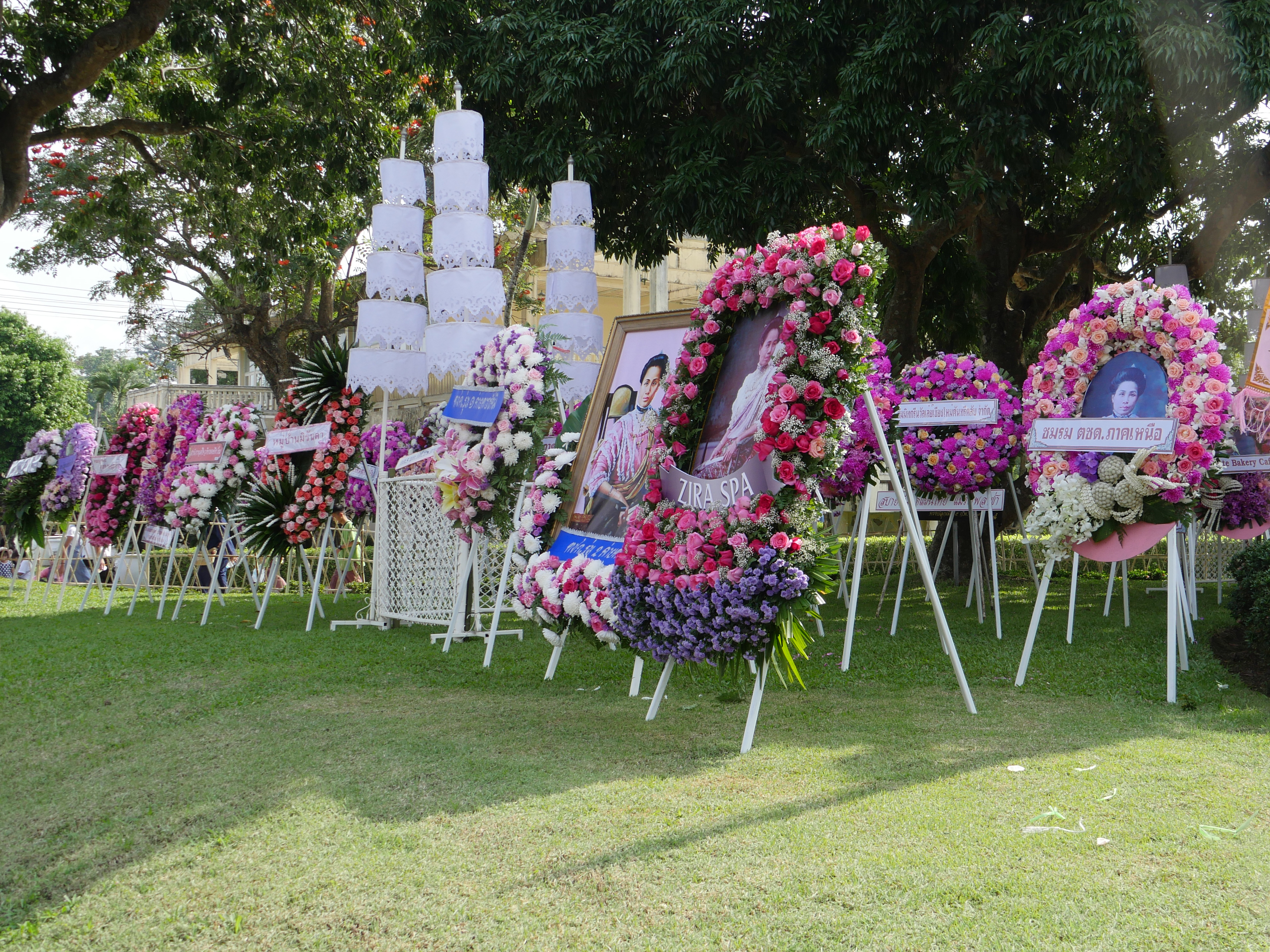 Jaarlijks op 9 december wordt de sterfdag van Prinses Dara Ratsami herdacht op het terrein van het Dara Phirom Palace. In 2018 was het 85 jaar geleden dat de prinses was overleden. Veel bedrijven an andere organistaties plaatsen een krans op het terrein in de directe omgeving van het standbeeld van de prinses.